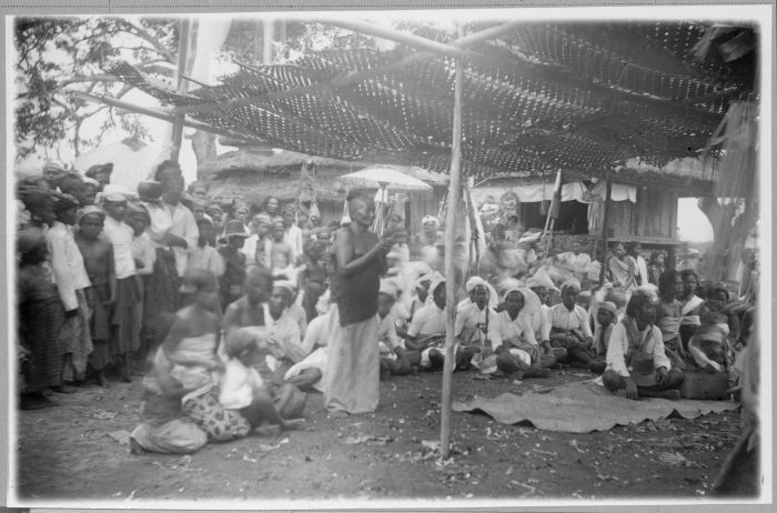 Negatief. Viering van het Kuniganfeest te Serangan, aan de zuidkust van Bali.